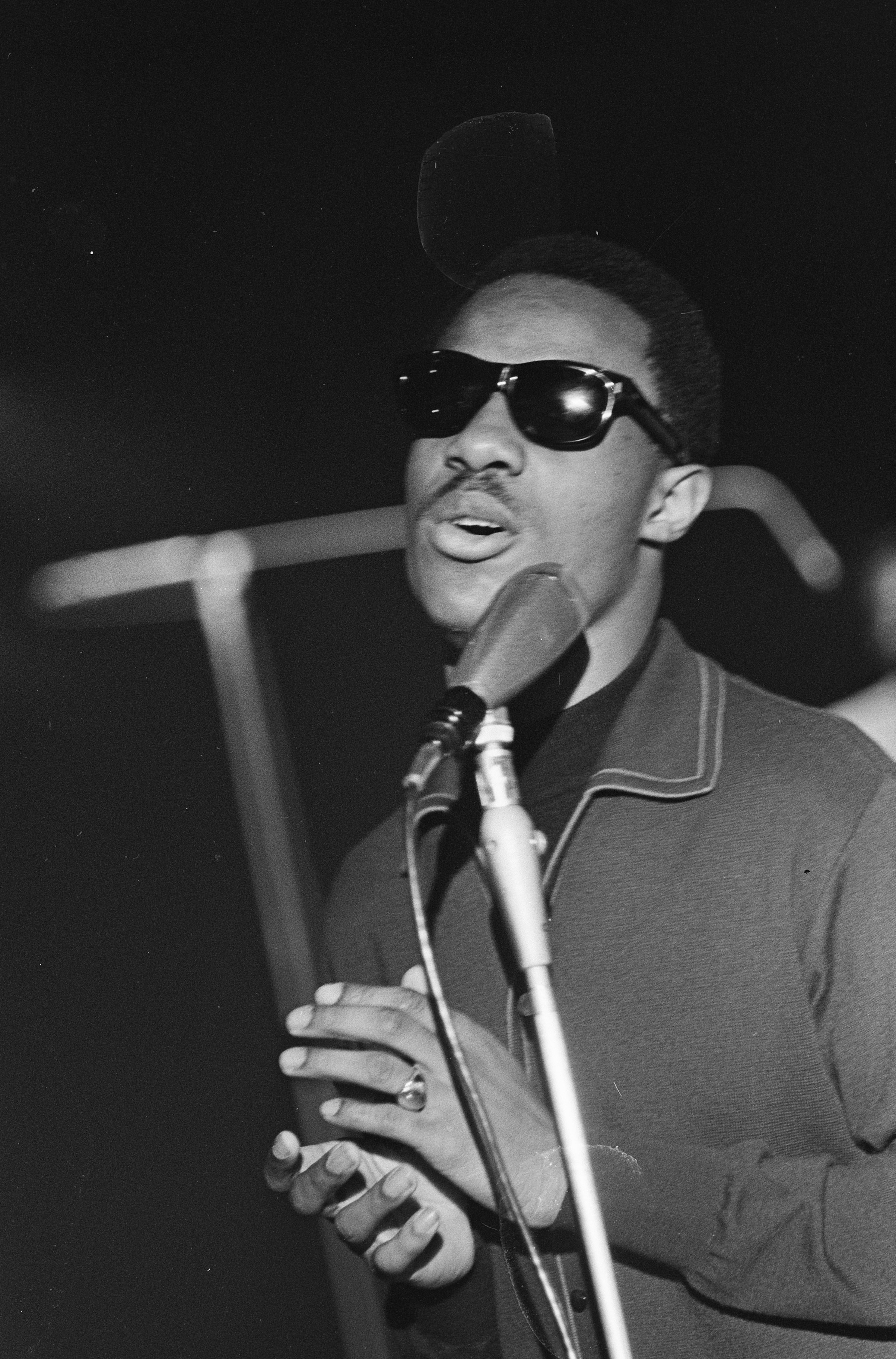 Collectie / Archief : Fotocollectie Anefo Reportage / Serie : [ onbekend ] Beschrijving : Stevie Wonder (zanger) voor TROS-TV Datum : 30 oktober 1967 Trefwoorden : zangers Persoonsnaam : Stevie Wonder Instellingsnaam : TROS Fotograaf : Nijs, Jac. de / Anefo Auteursrechthebbende : Nationaal Archief Materiaalsoort : Negatief (zwart/wit) Nummer archiefinventaris : bekijk toegang 2.24.01.05 Bestanddeelnummer : 920-8211